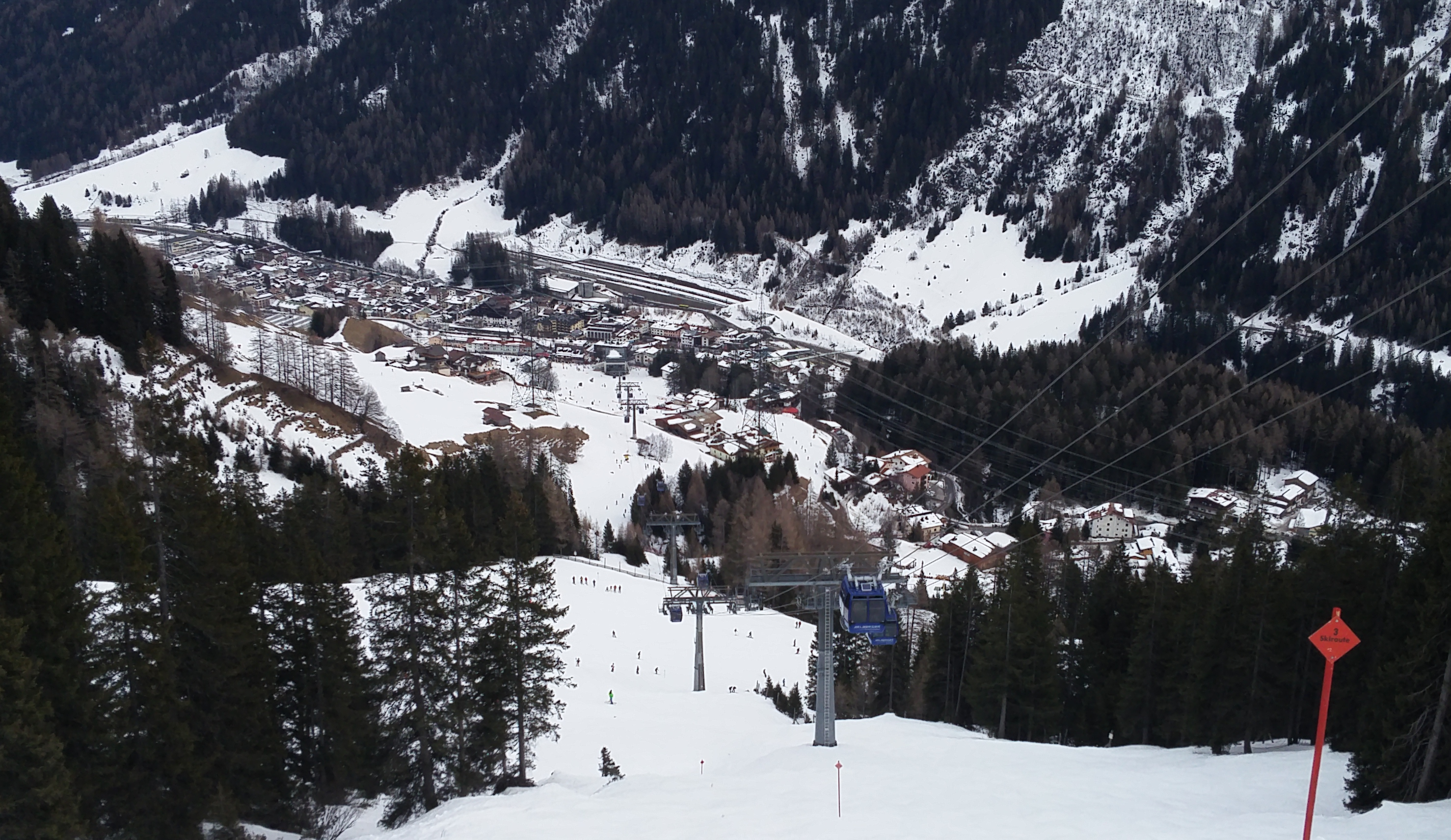 Blick auf St. Anton am Arlberg und die Galzigbahn von der Skiroute 3 Osthang Steilhang